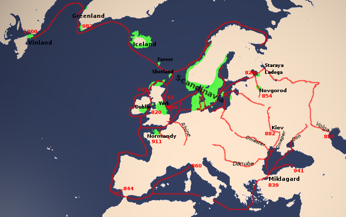 Map of medieval North Germanic territories and expeditions (Orthographic projection (cartography)), based on en wiki